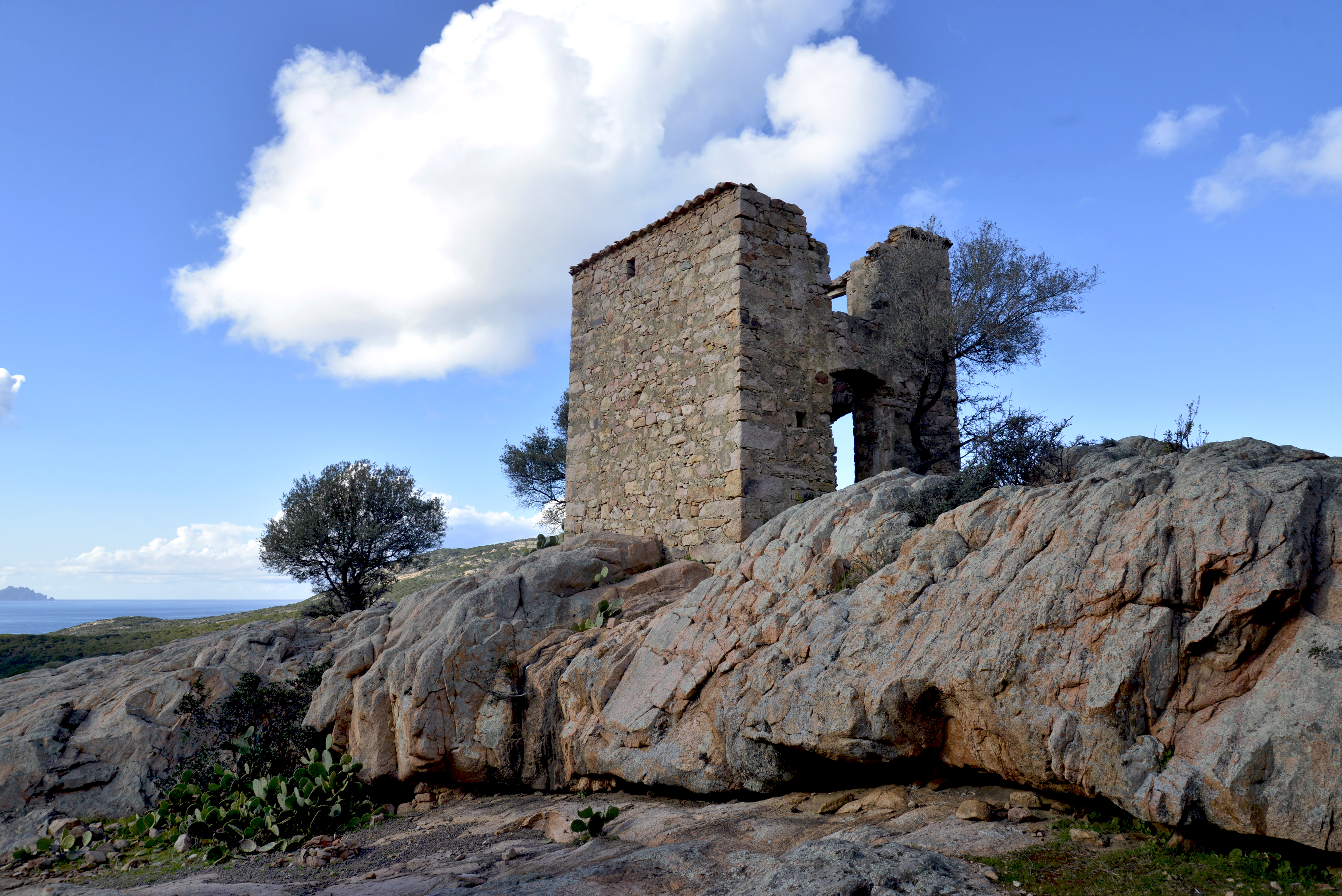 Calenzana, Balagne (Haute-Corse) - La torre Mozza dans l'enceinte de l'ancienne propriété (maison de chasse) du prince Pierre Bonaparte à Luzzipeo